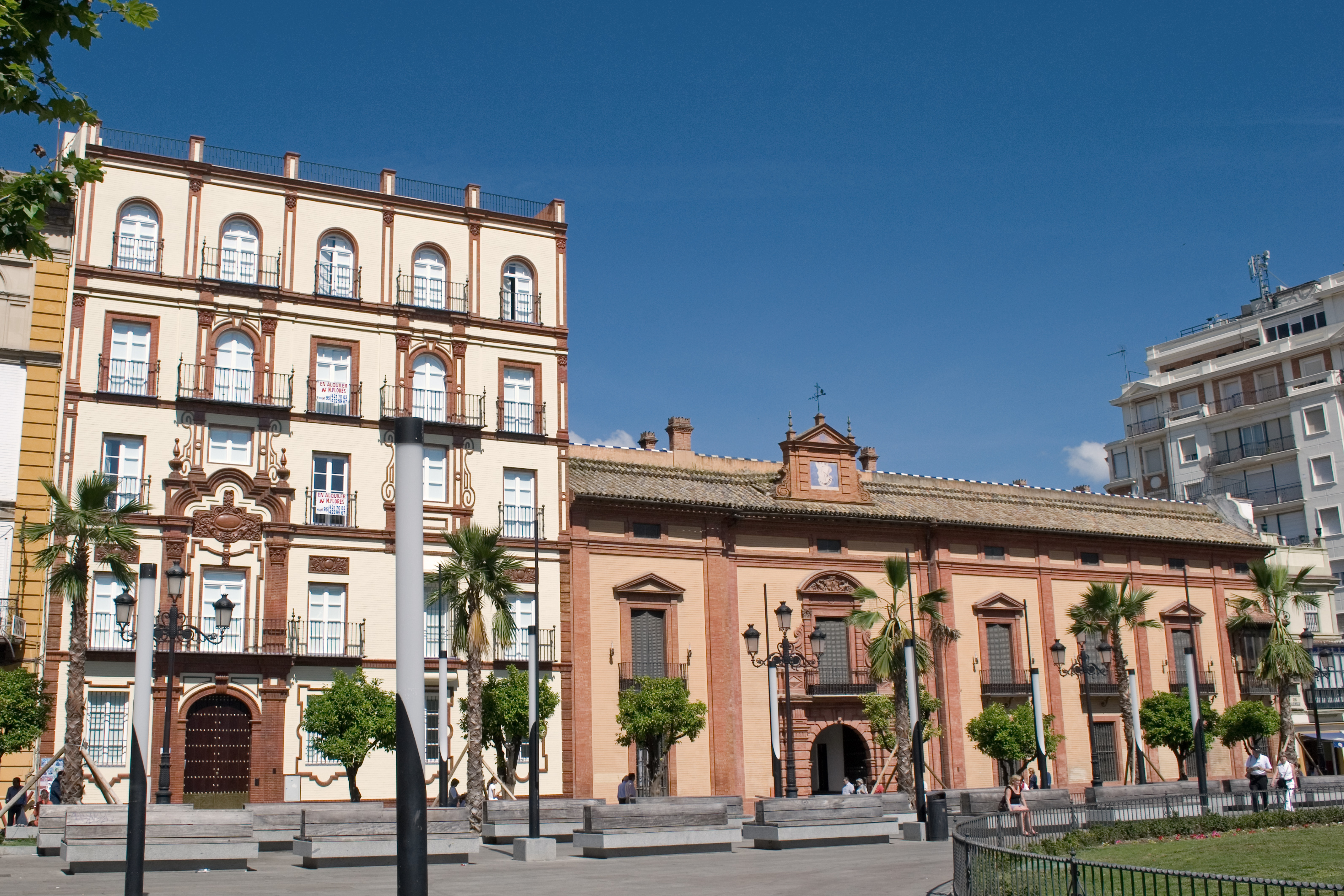 Puerta de Jerez, Sevilla. Edificio de viviendas para Calixto Paz y Alegría, (1929), obra de Juan Talavera y Heredia y Casa de los Guardiola, antiguo palacio del conde de Aguiar, edificado por José Gomez Otero y José Espiau de la Coba.